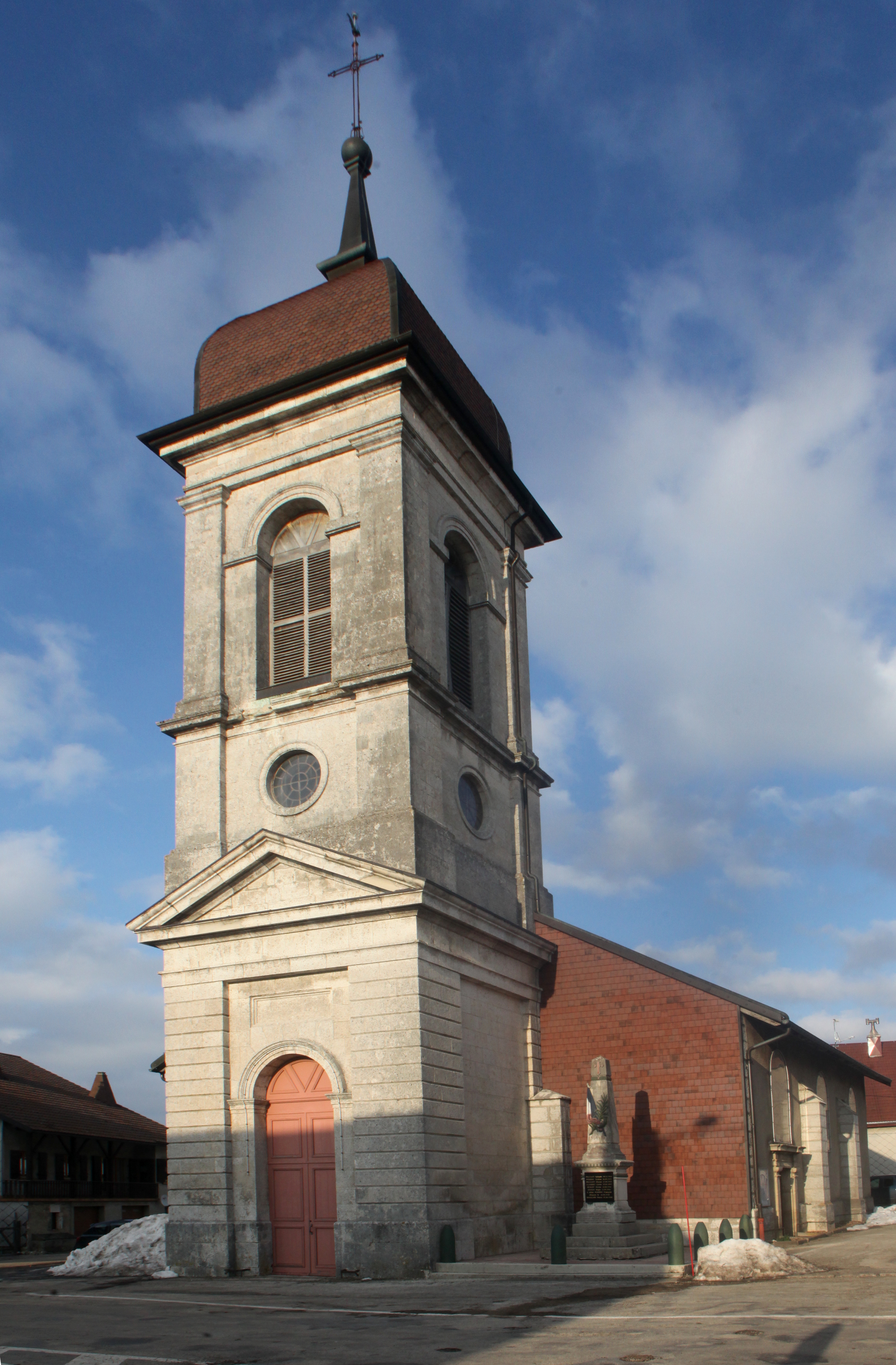 L'église de Sainte-Colombe (Doubs).